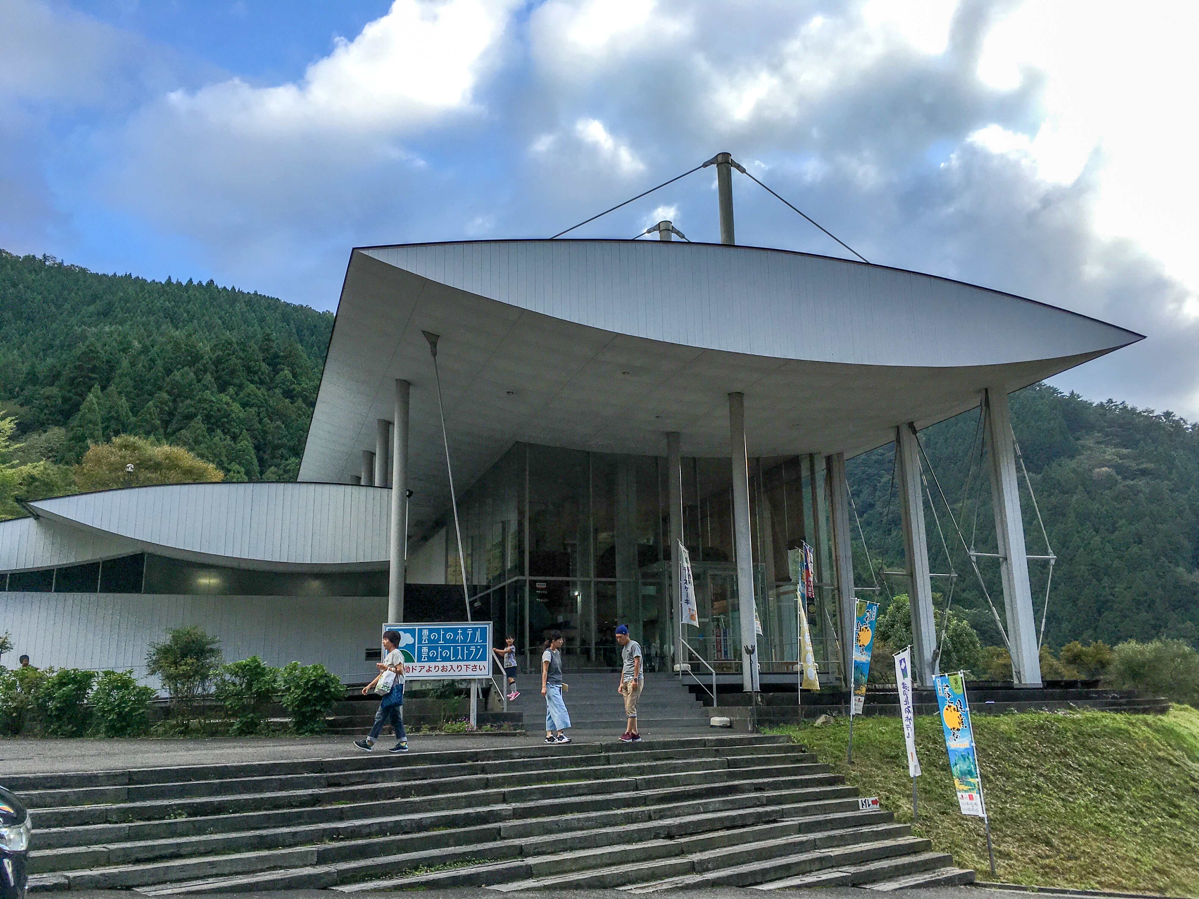 隈研吾の作品